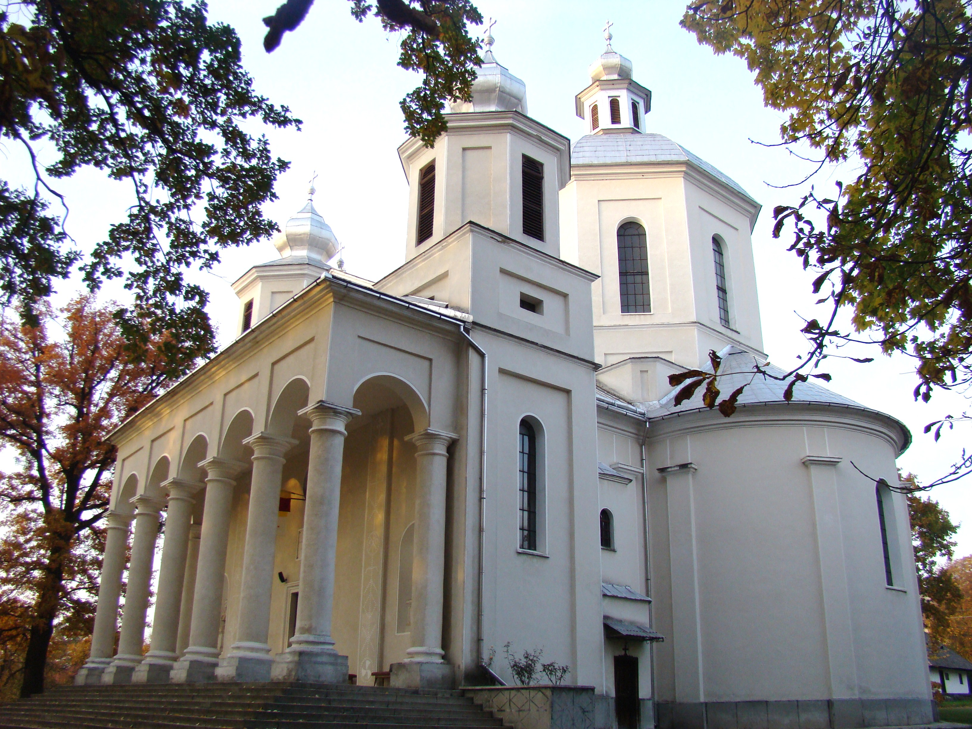 Biserica Unirii Tuturor Românilor "Adormirea Maicii Domnului", sat Șișești; comuna Șișești, județul Maramureș 01